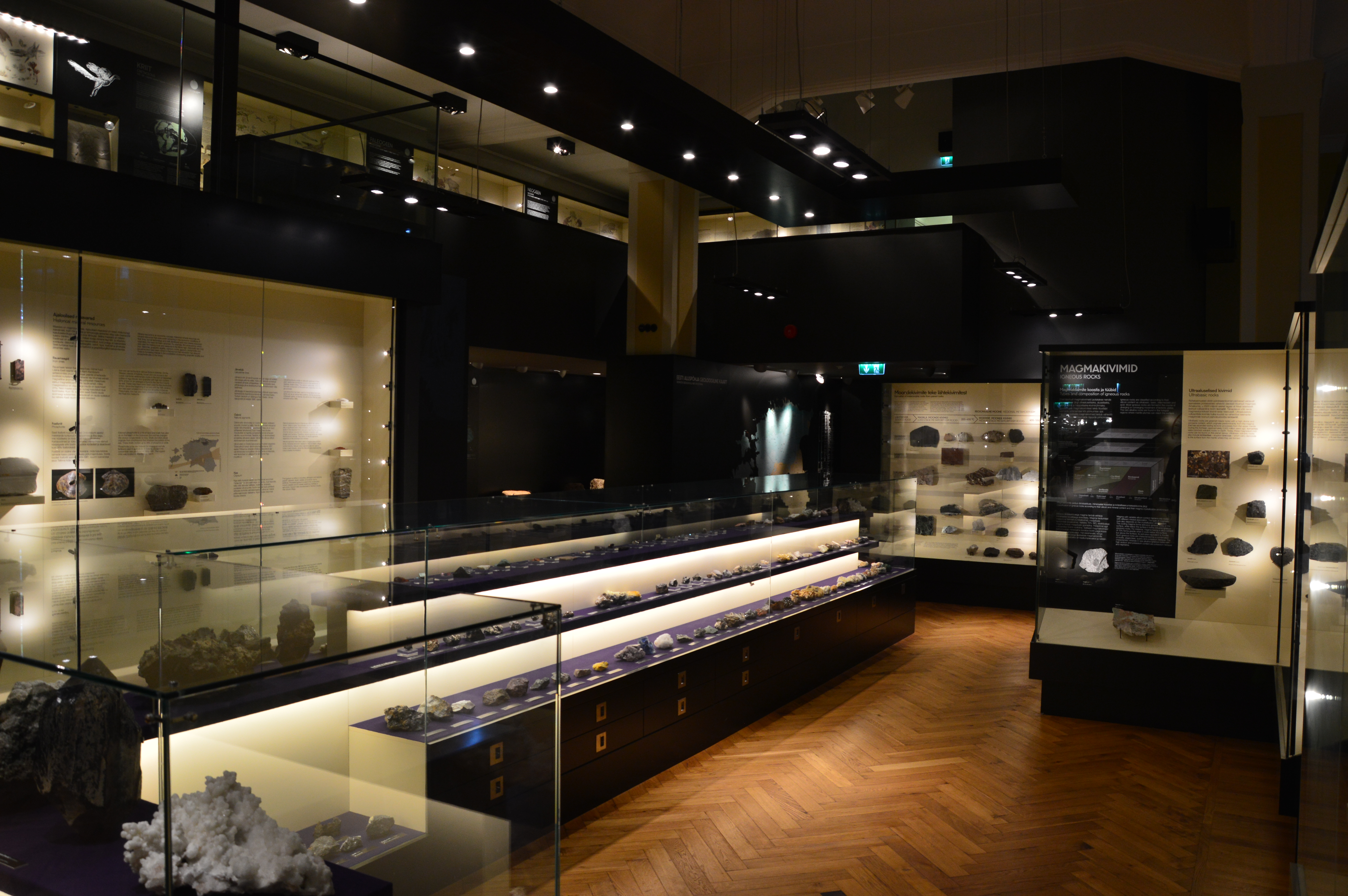 Tartu Ülikooli Loodusmuuseum. Sisevaade.